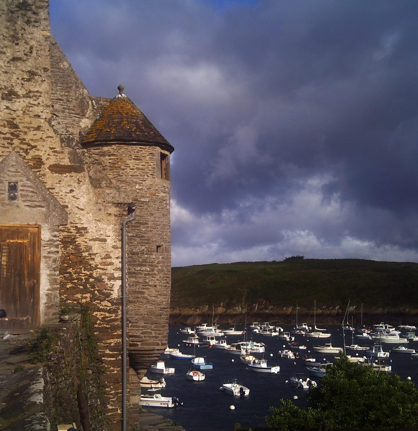 Port du Conquet